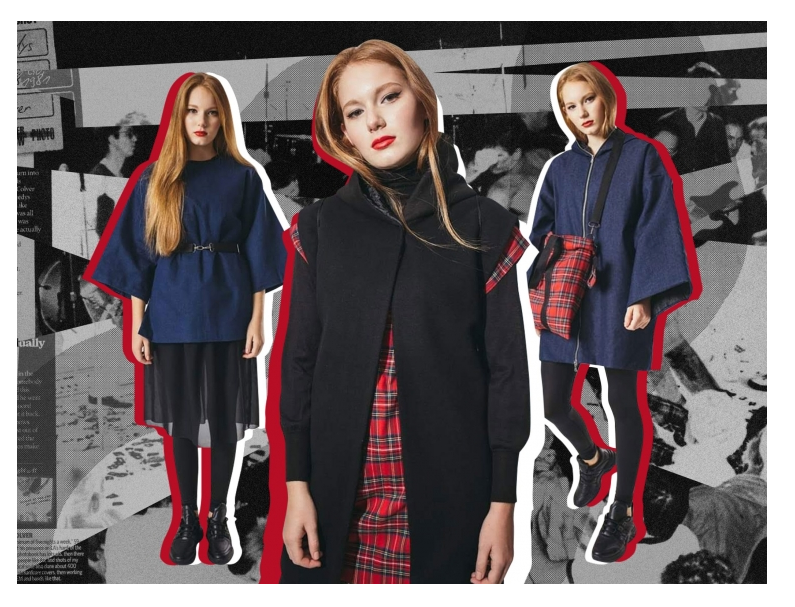 FW20